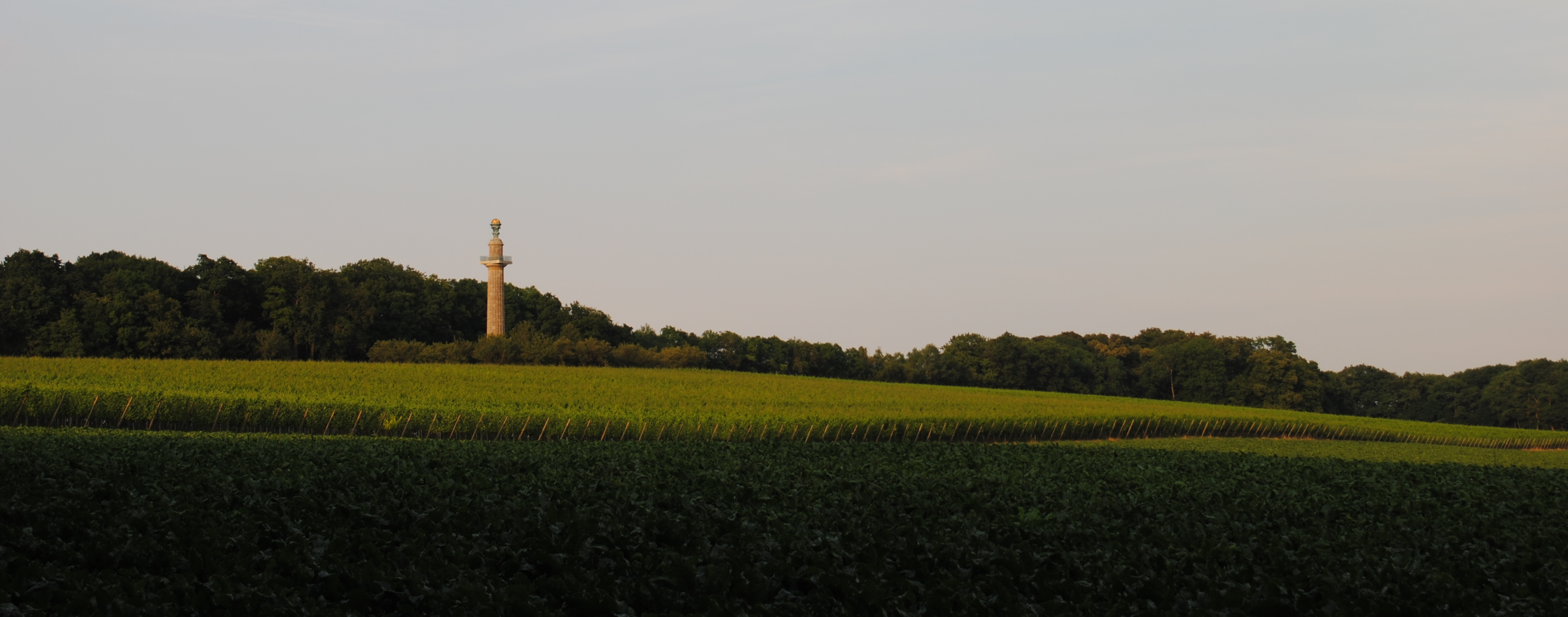 Gaibacher Schlosspark